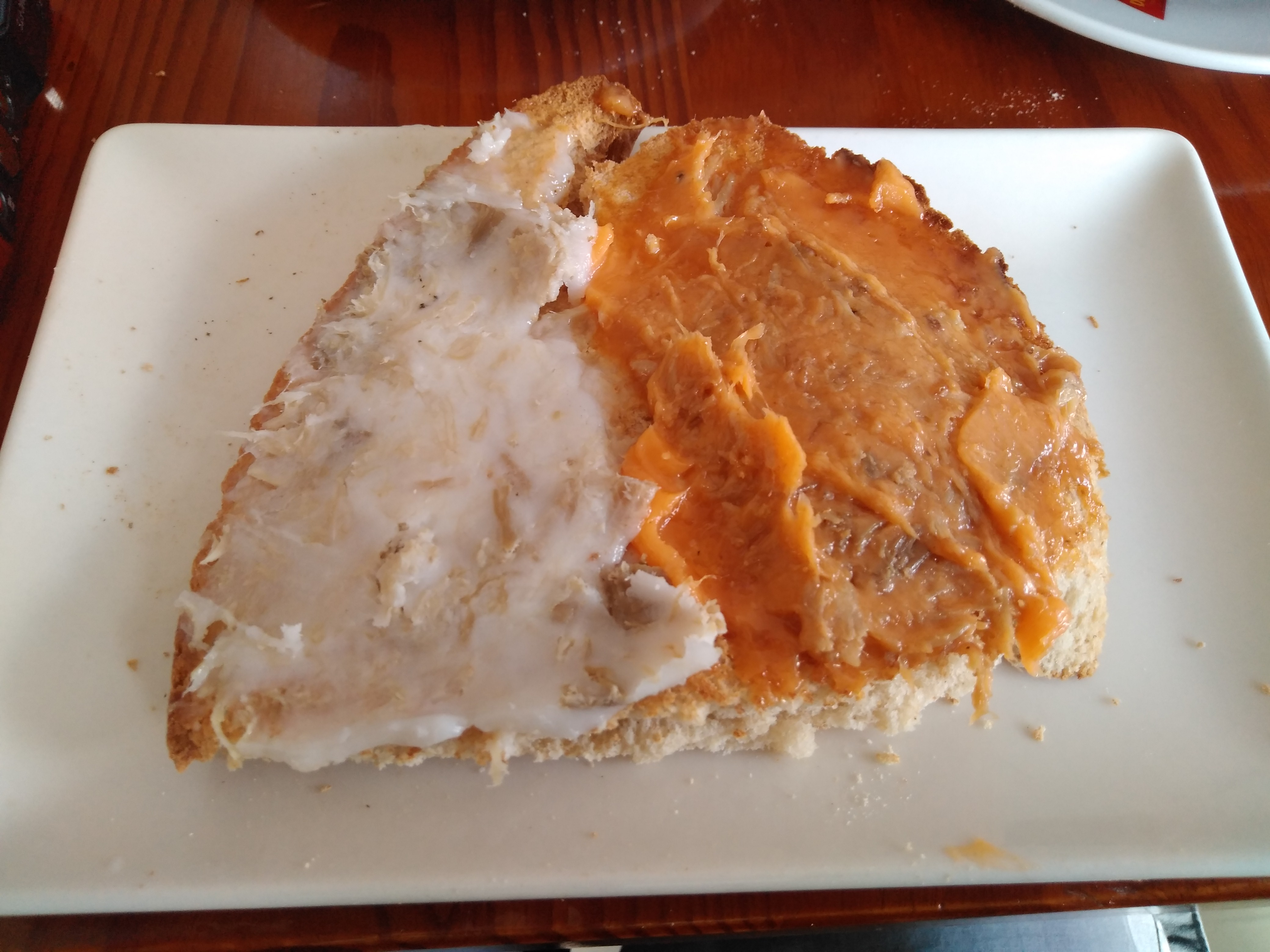 tostada con zurrapas de lomo en manteca blanca y colorá